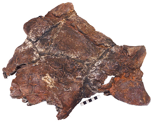 Skull of Oohkotokia horneri, gen. et sp. nov. (MOR 433, holotype)